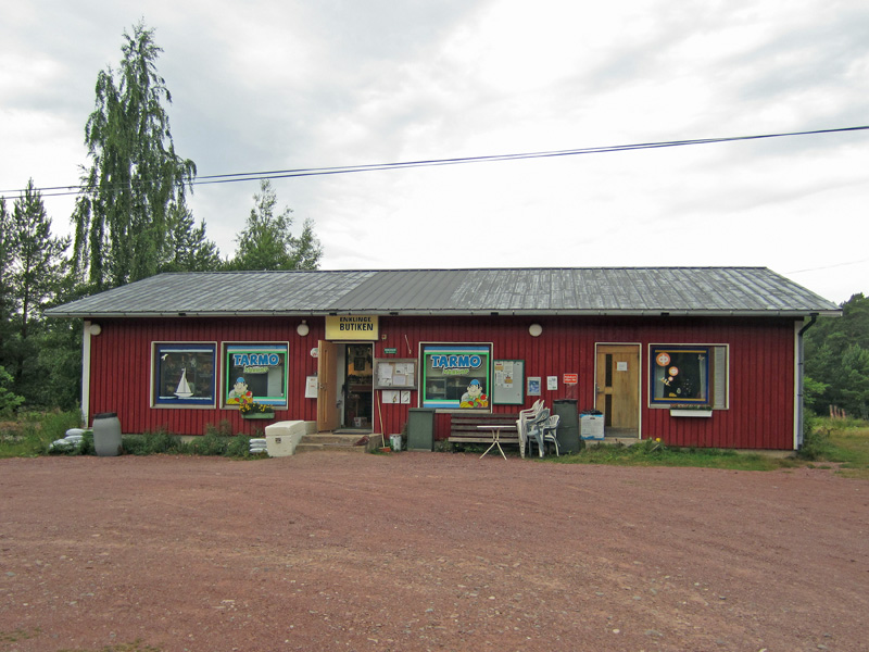 Enklinge andelshandel